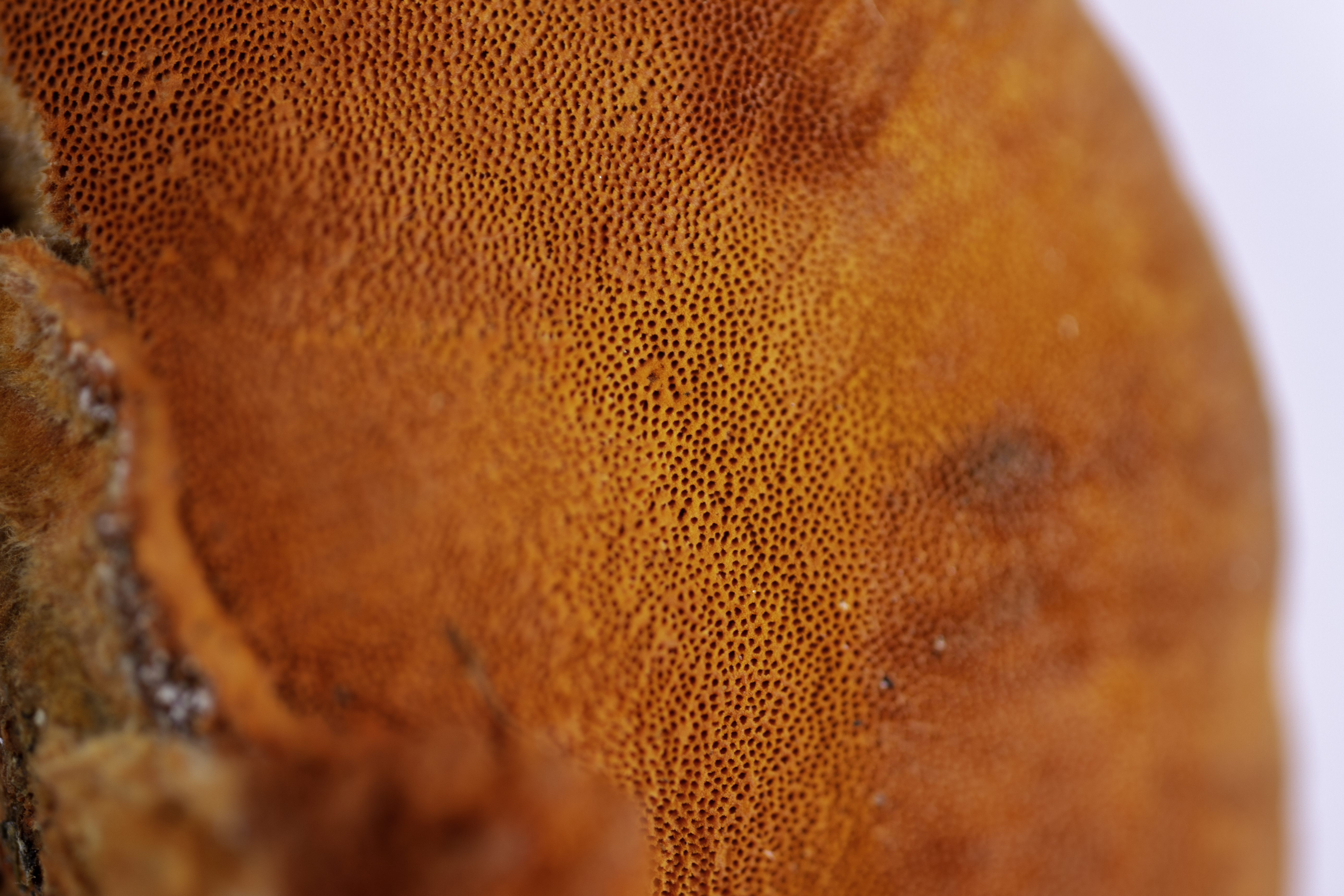 Cuerpo fructífero del hongo Pycnoporus sanguieus, detallando poros.